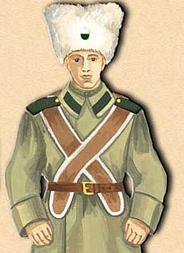 Солдаты 1-го Средне_Сибирского армейского корпуса (Cropped version)